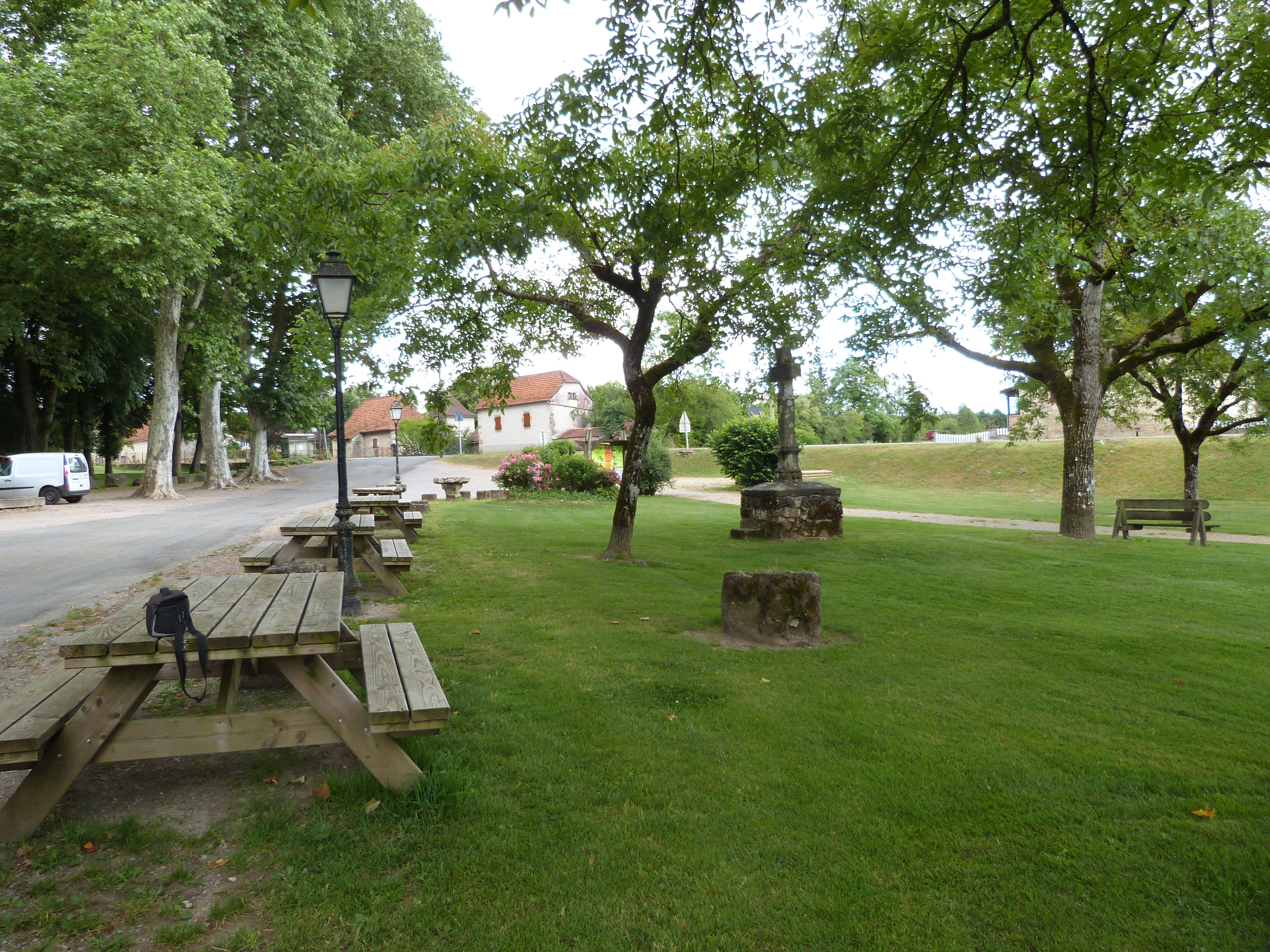 Le "couderc", place herbeuse de Rudelle